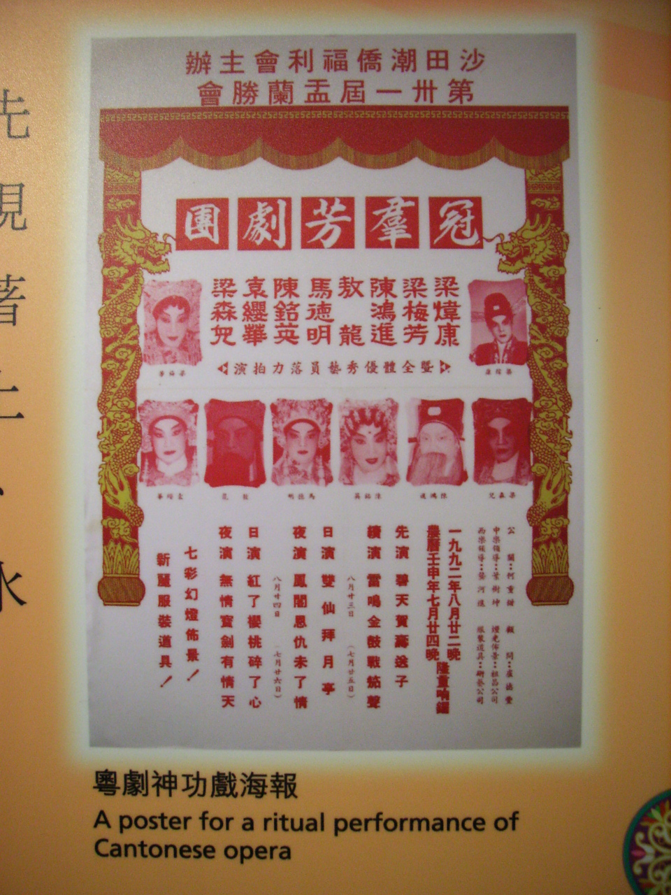 香港戲曲歷史文物展 2006年2月28日至6月30日